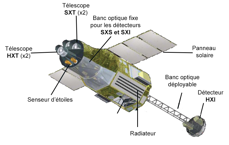 Schéma du télescope spatial ASTRO-H